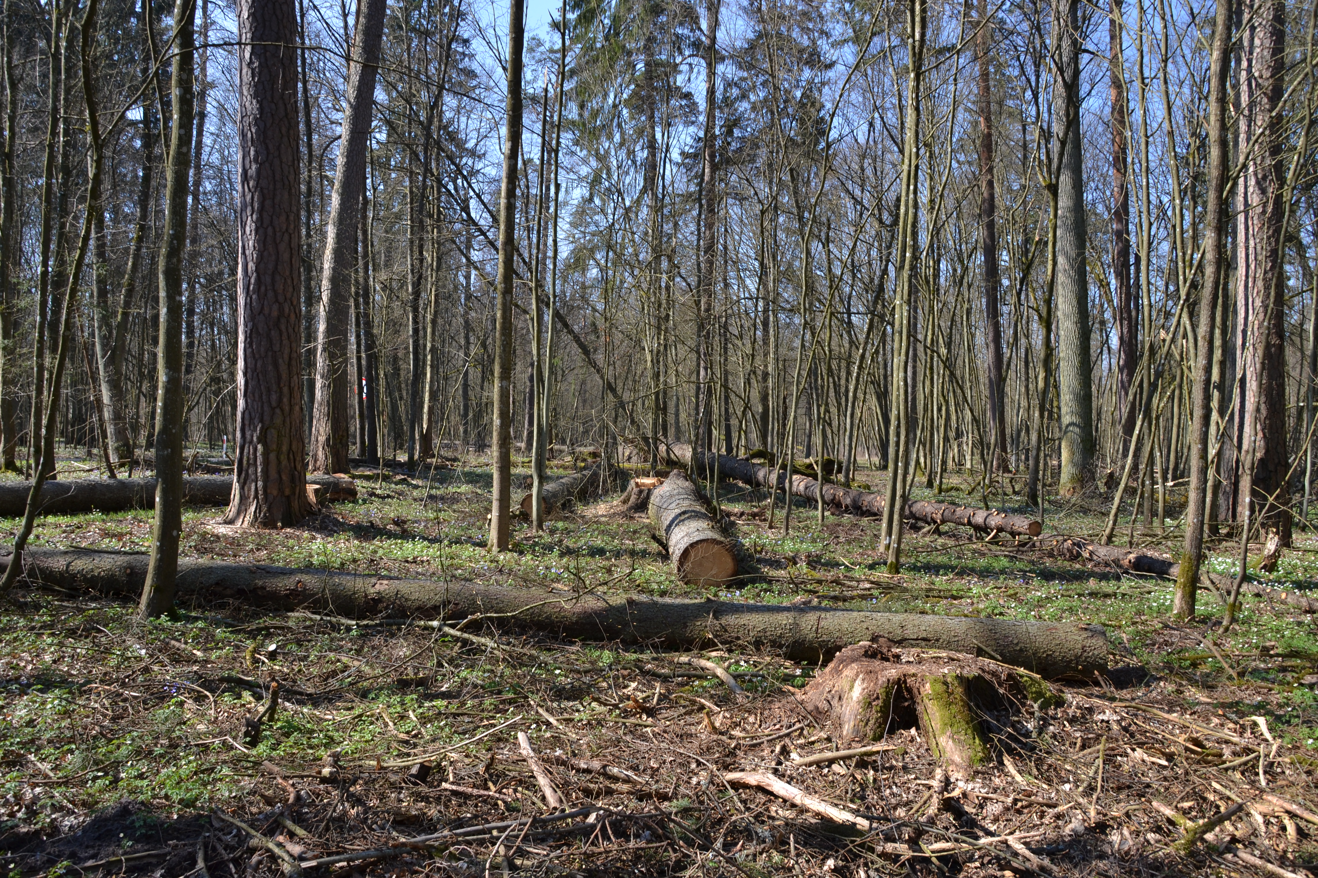 Houtkap neemt industriële vormen aan in werelderfgoedgebied "Woud van Bialowieza". Hier in Lanschapsreservaat Wladyslaw Szafer op 2 april 2017.